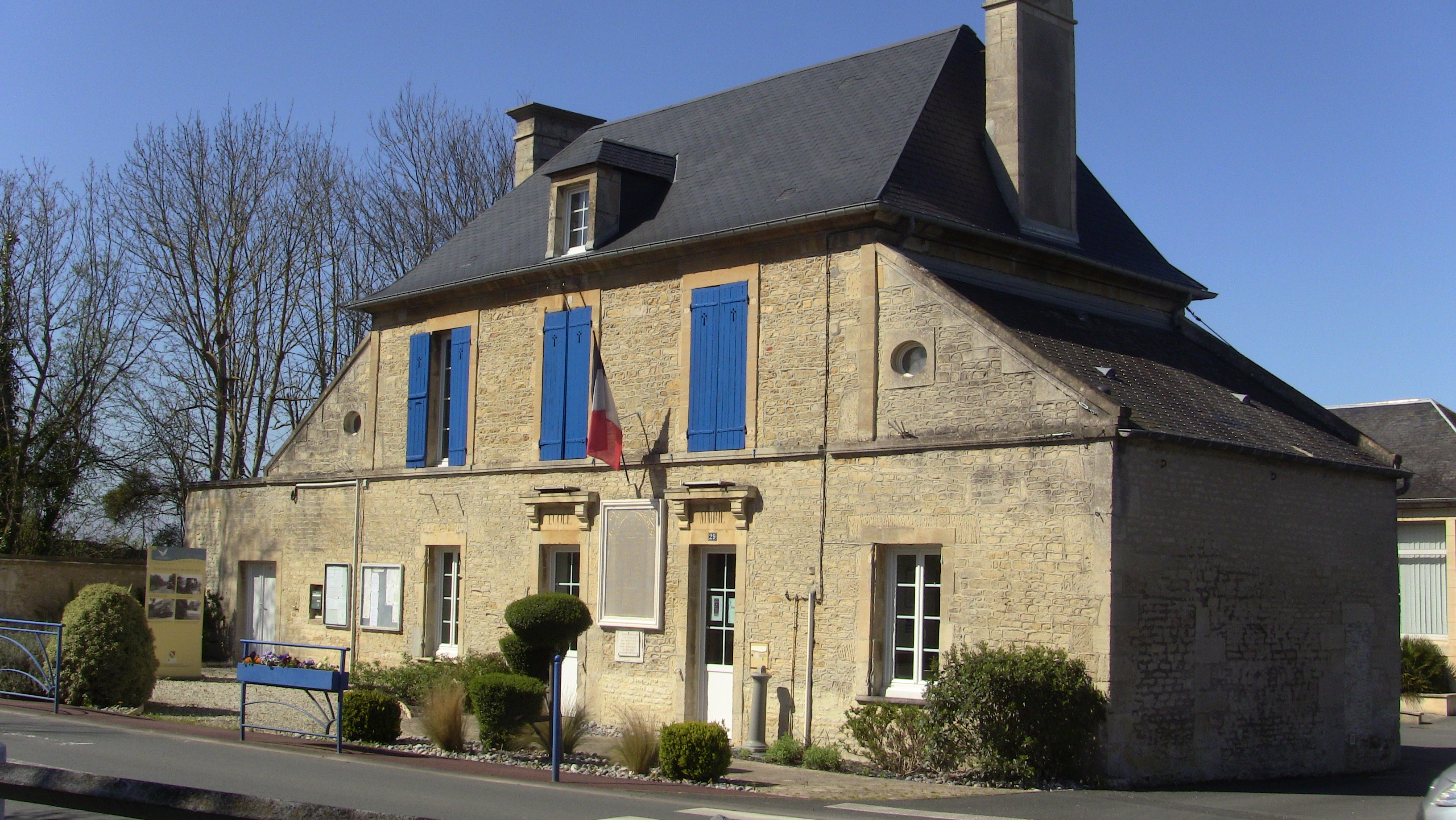 La mairie de Sallenelles, Calvados; France.